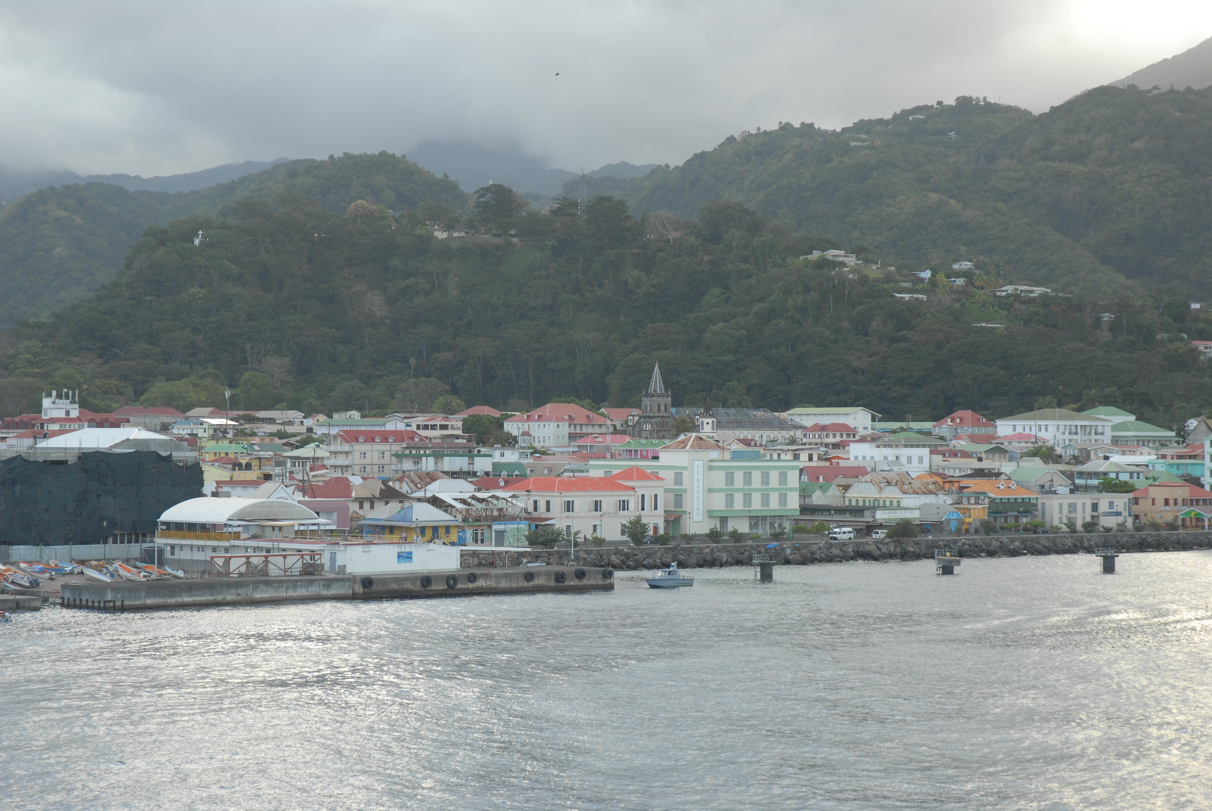 Roseau, Dominica